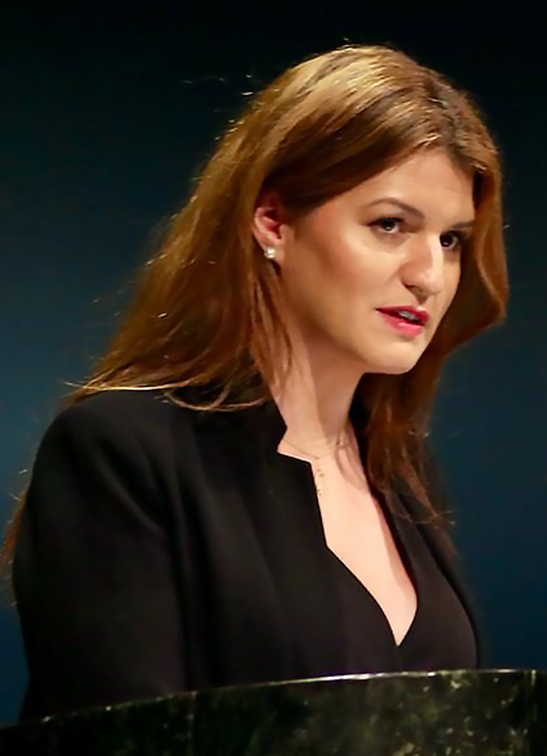 Marlène Schiappa, Secrétaire d'État auprès du Premier ministre, chargée de l'Égalité entre les femmes et les hommes et de la Lutte contre les discriminations, à la tribune de l'ONU lors de l'ouverture de la 63e session de la conférence sur la condition féminine en mars 2019.